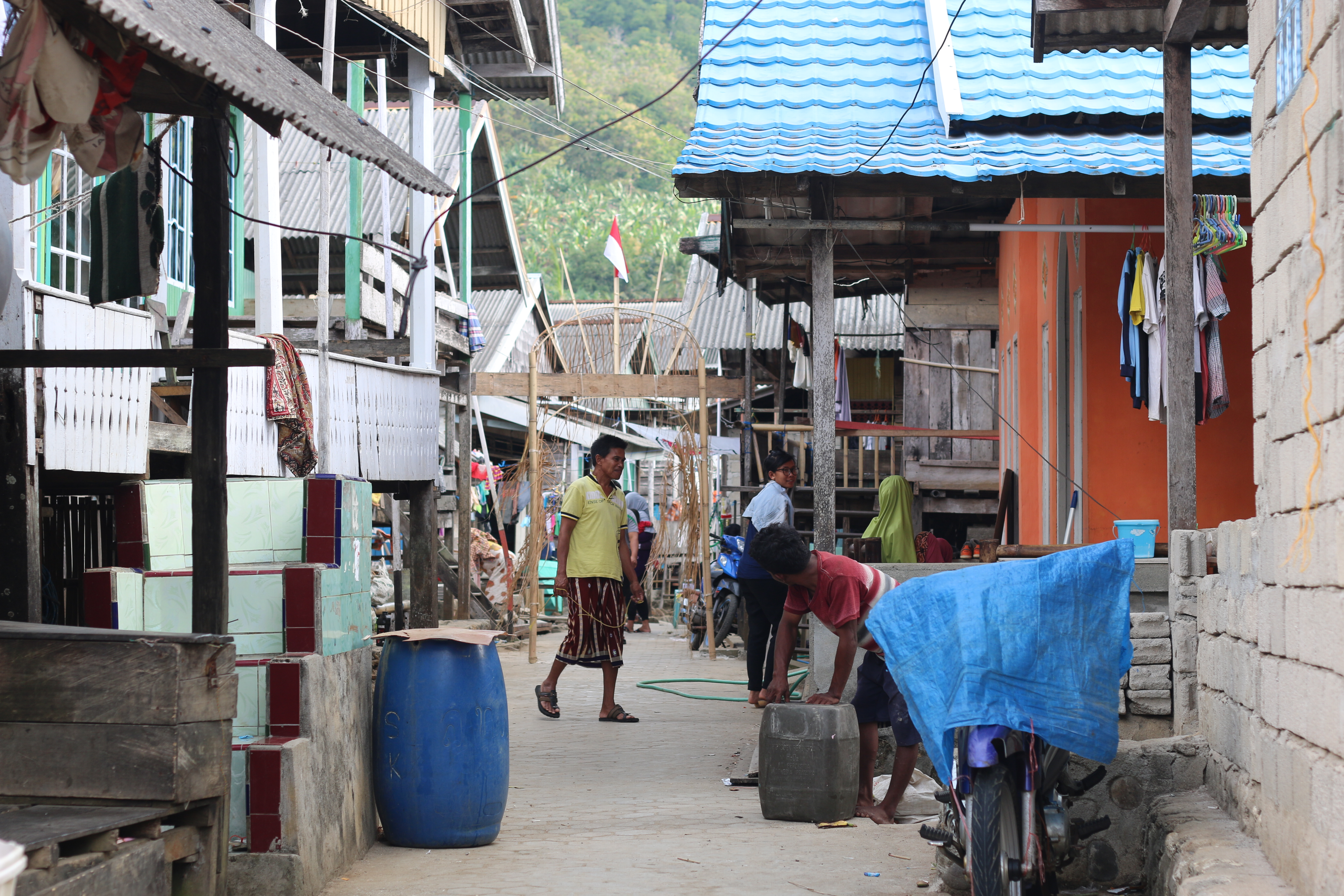 Desa Maradapan